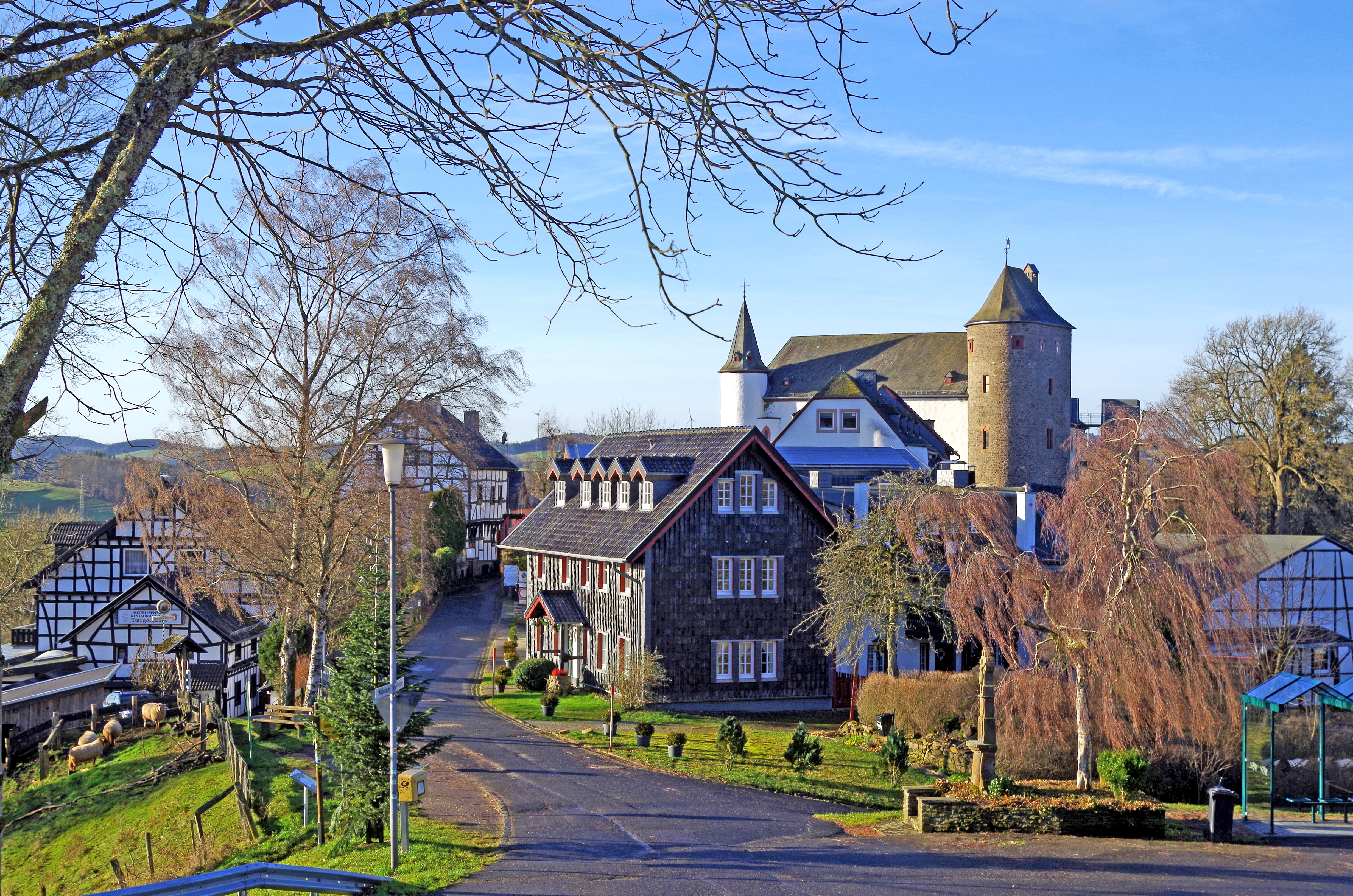 Blick auf die Wildenburg mit Burgsiedlung